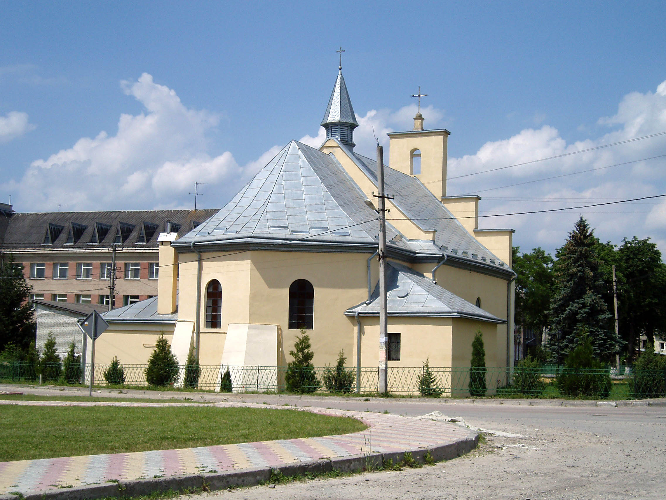 Костел святого Миколая в Миколаєві Львівської області. Збудований у першій третині XVII ст.